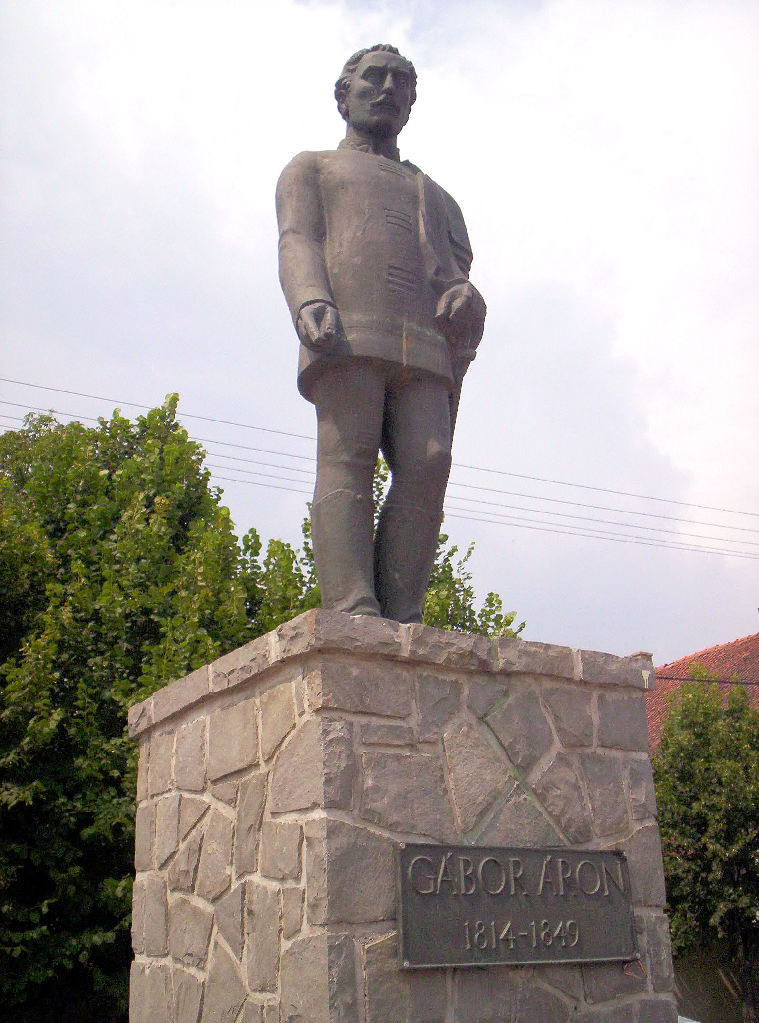 Gábor Áron szobra Berecken. Vargha Mihály alkotása (1992)